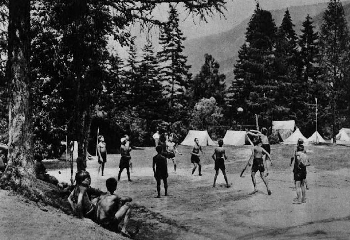 Gozdovniki v Martuljku